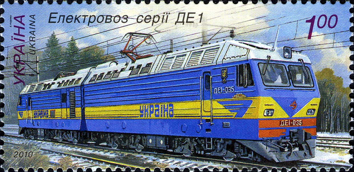 Марка України «Електровоз магістральний серії ДЕ1»